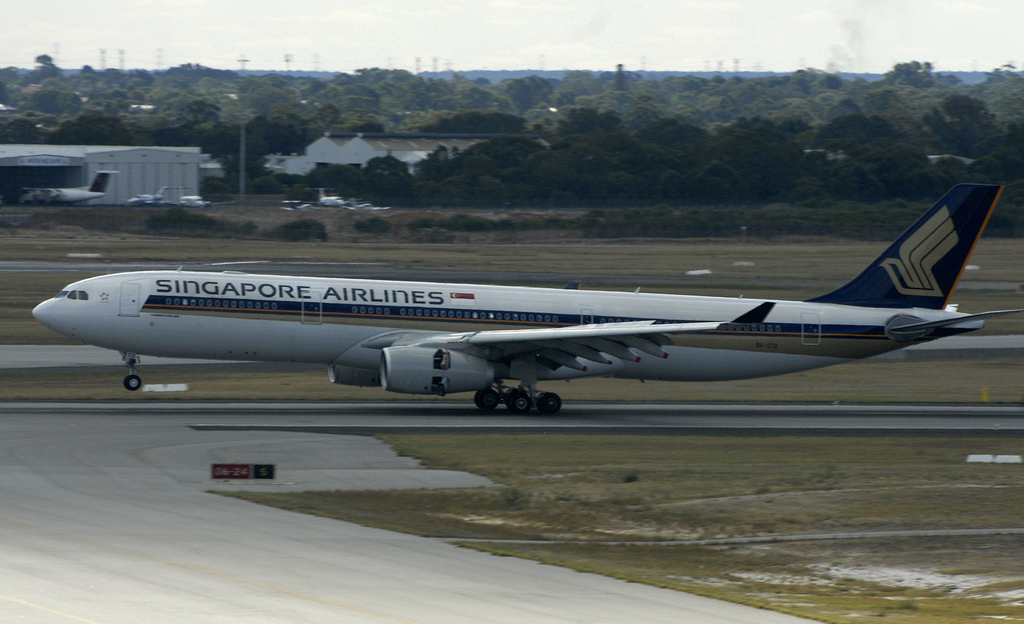 Singapore a330-343 landing